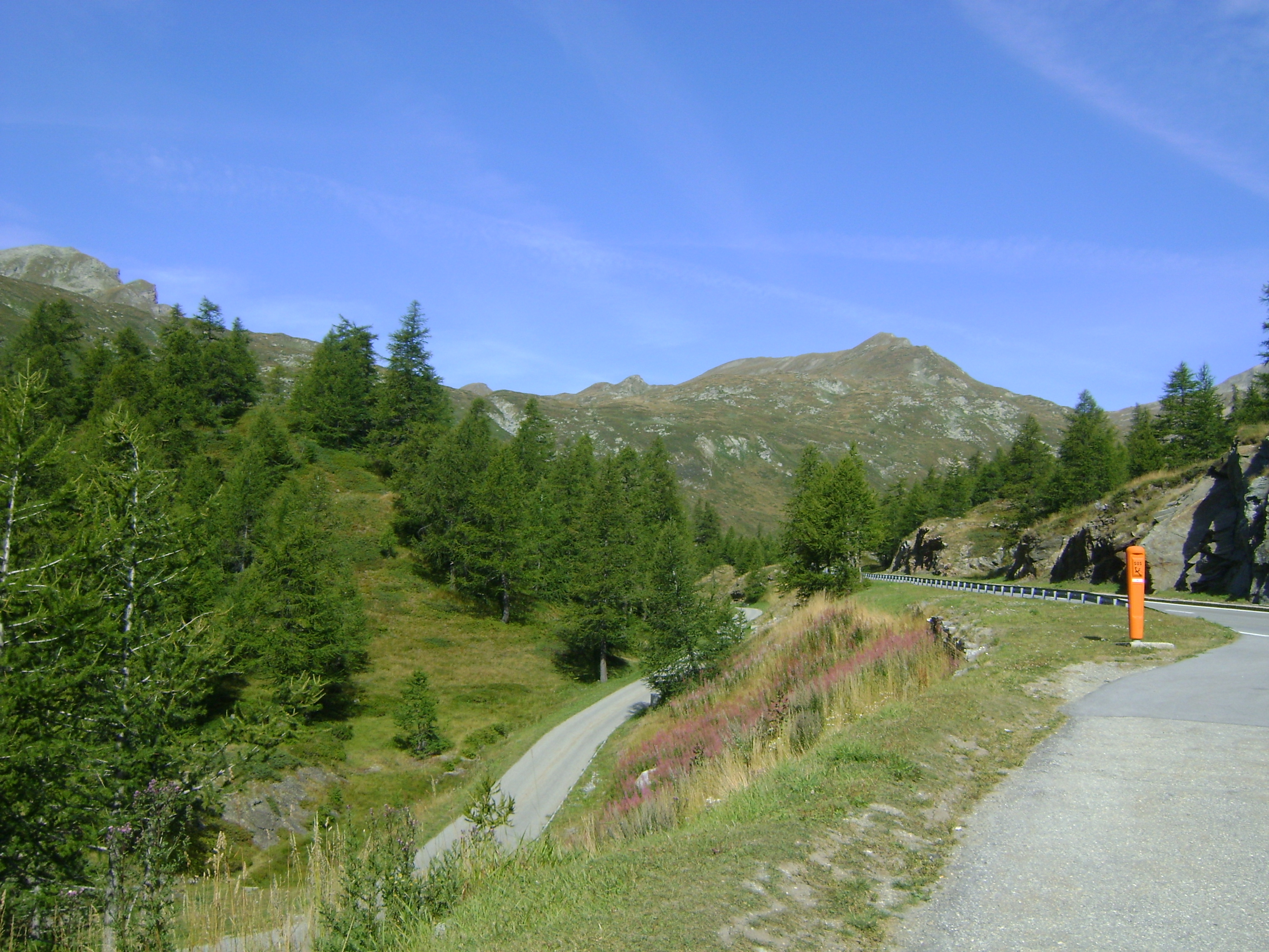 Il Passo del Sempione visto in estate.